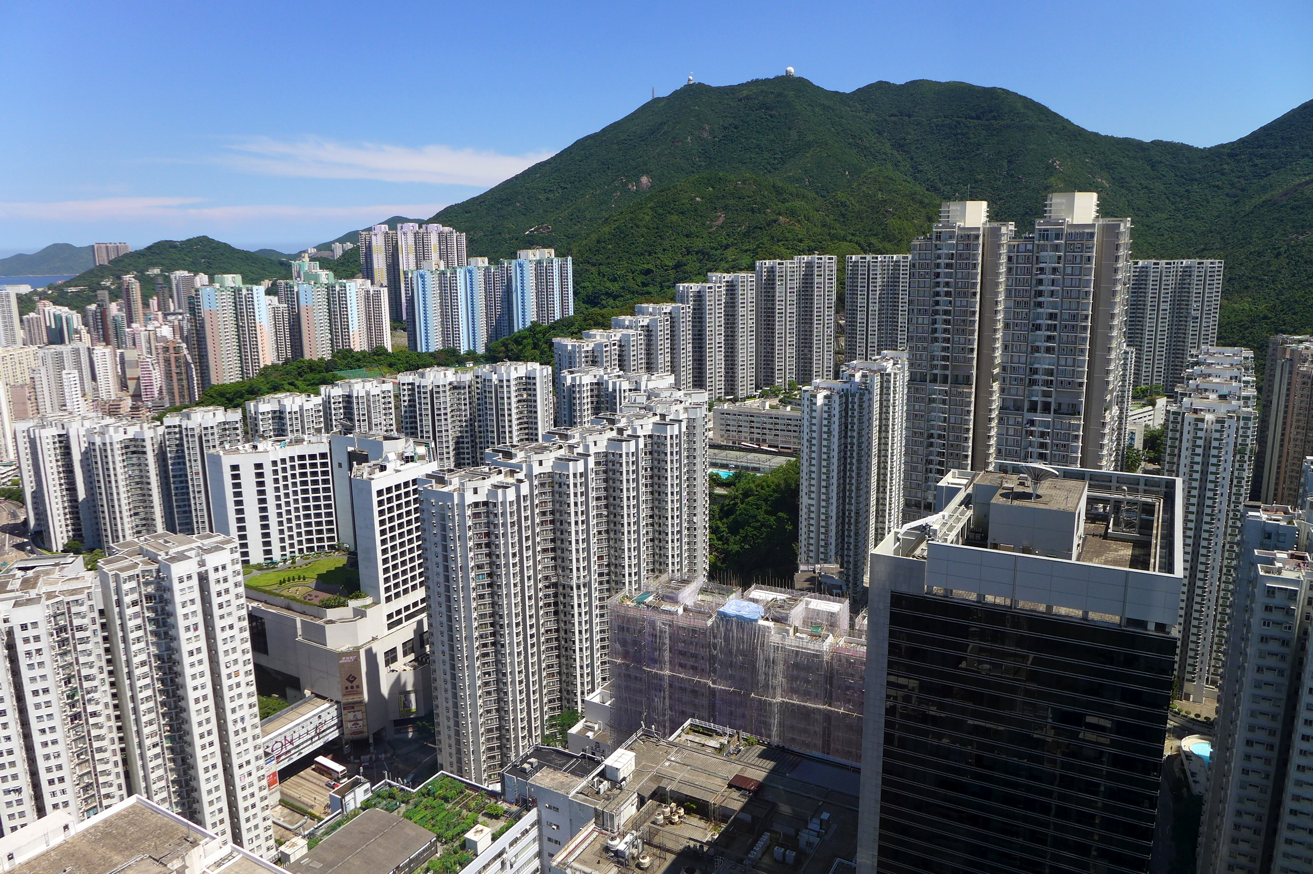 Kornhill